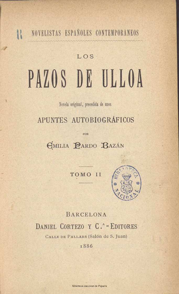 Los pazos de Ulloa : novela original, precedida de unos apuntes autobiográficos por Emilia Pardo Bazán Autora: Pardo Bazán, Emilia, Condesa de (1851-1921) Fecha: 1886 Datos de edición: Barcelona, Daniel Cortezo y Cª